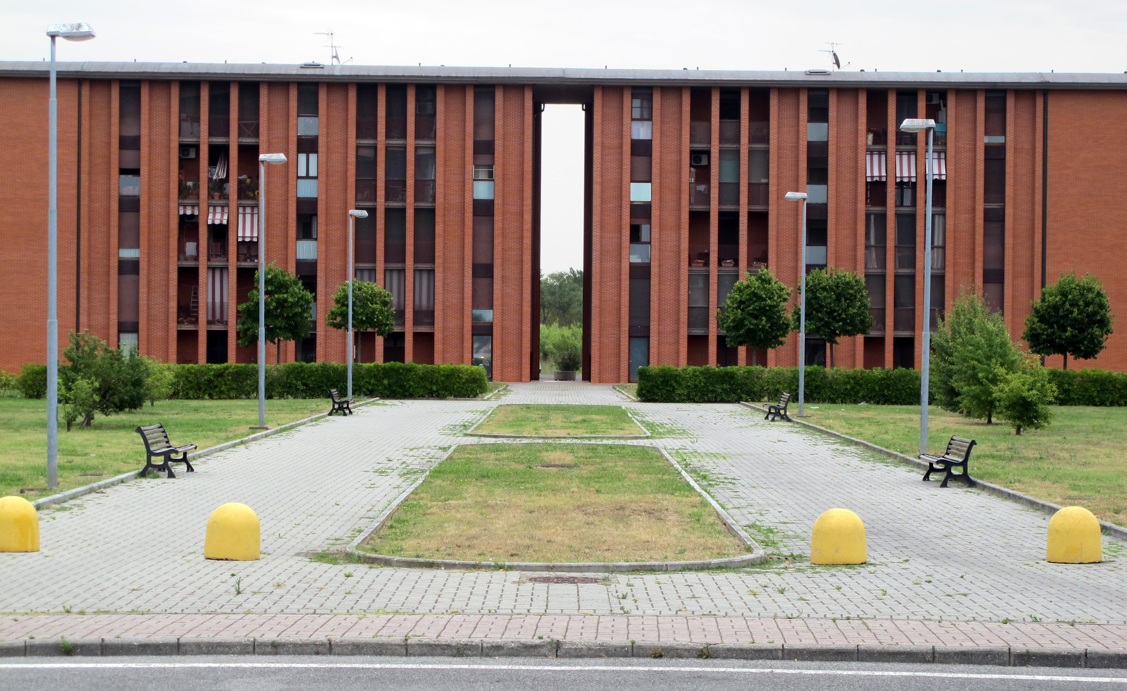 Pontedera